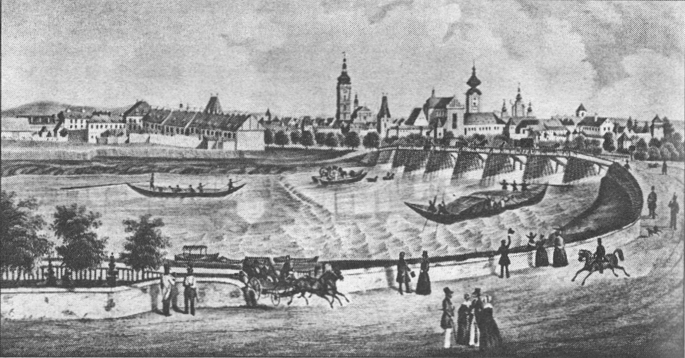 Litografie Dlouhého mostu z 19. století